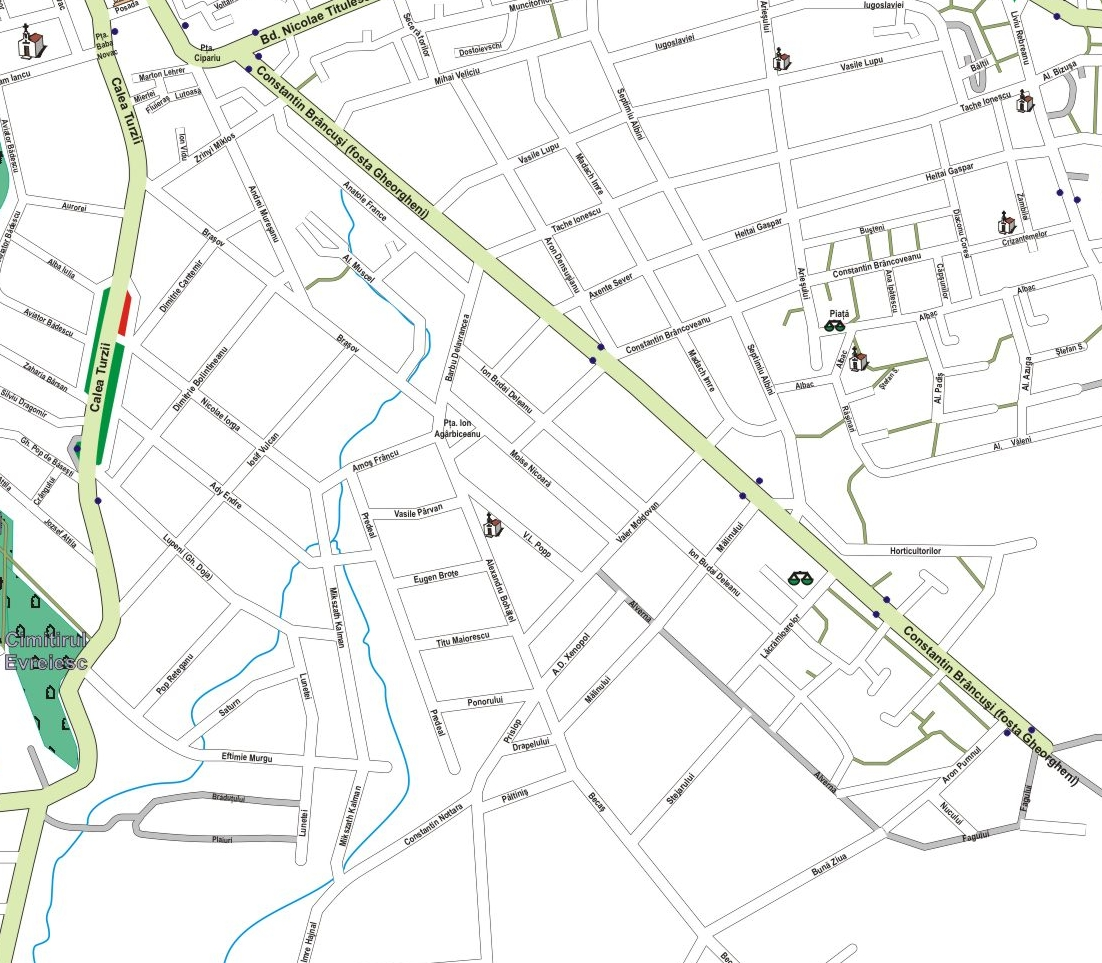 Harta cartierului Andrei Muresanu din Cluj